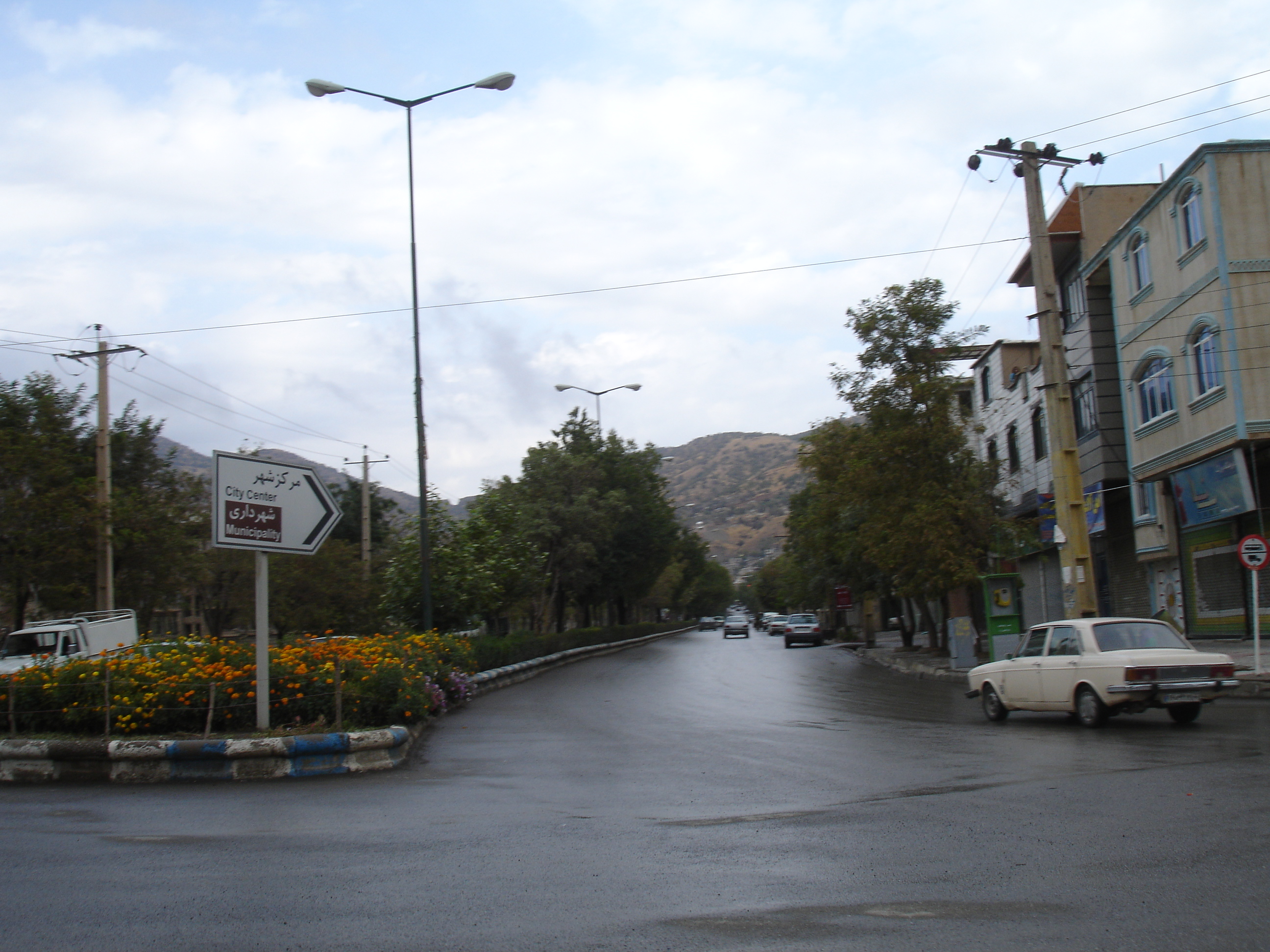 Marivan